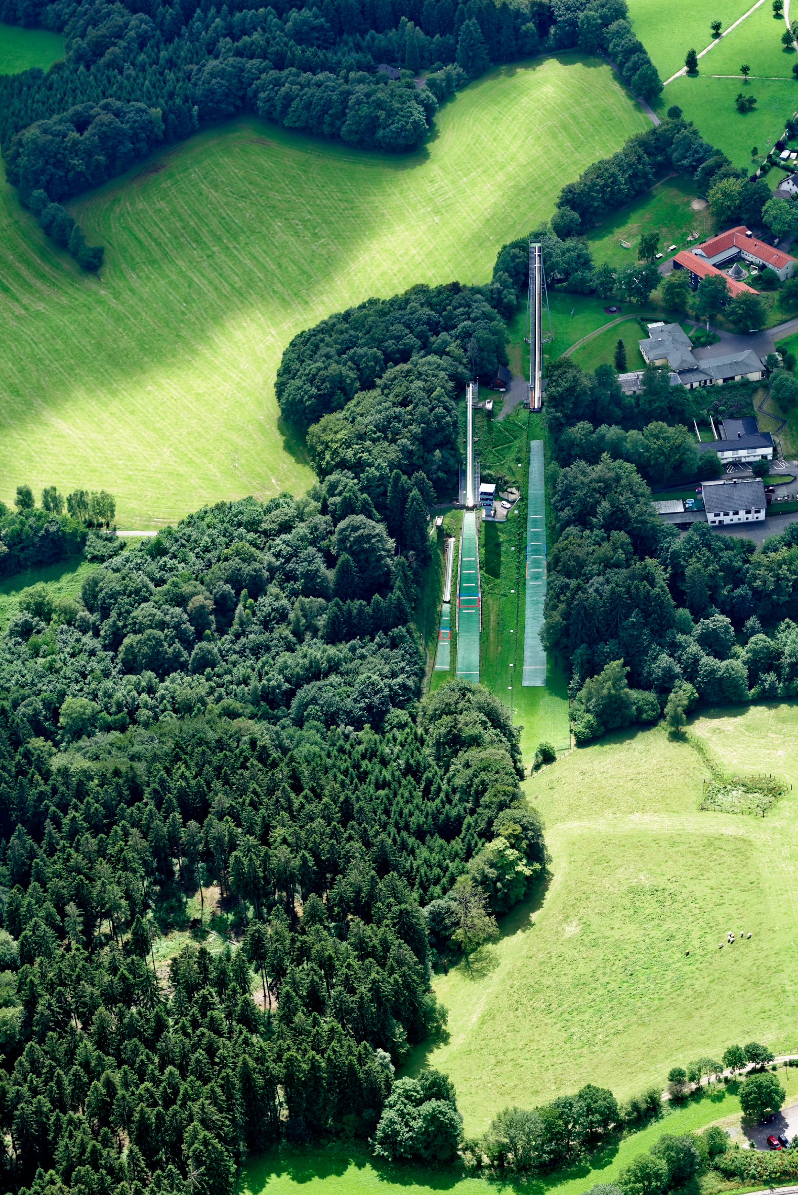 Luftaufnahme: Meinhardus-Schanzen in Meinerzhagen, Nordrhein-Westfalen